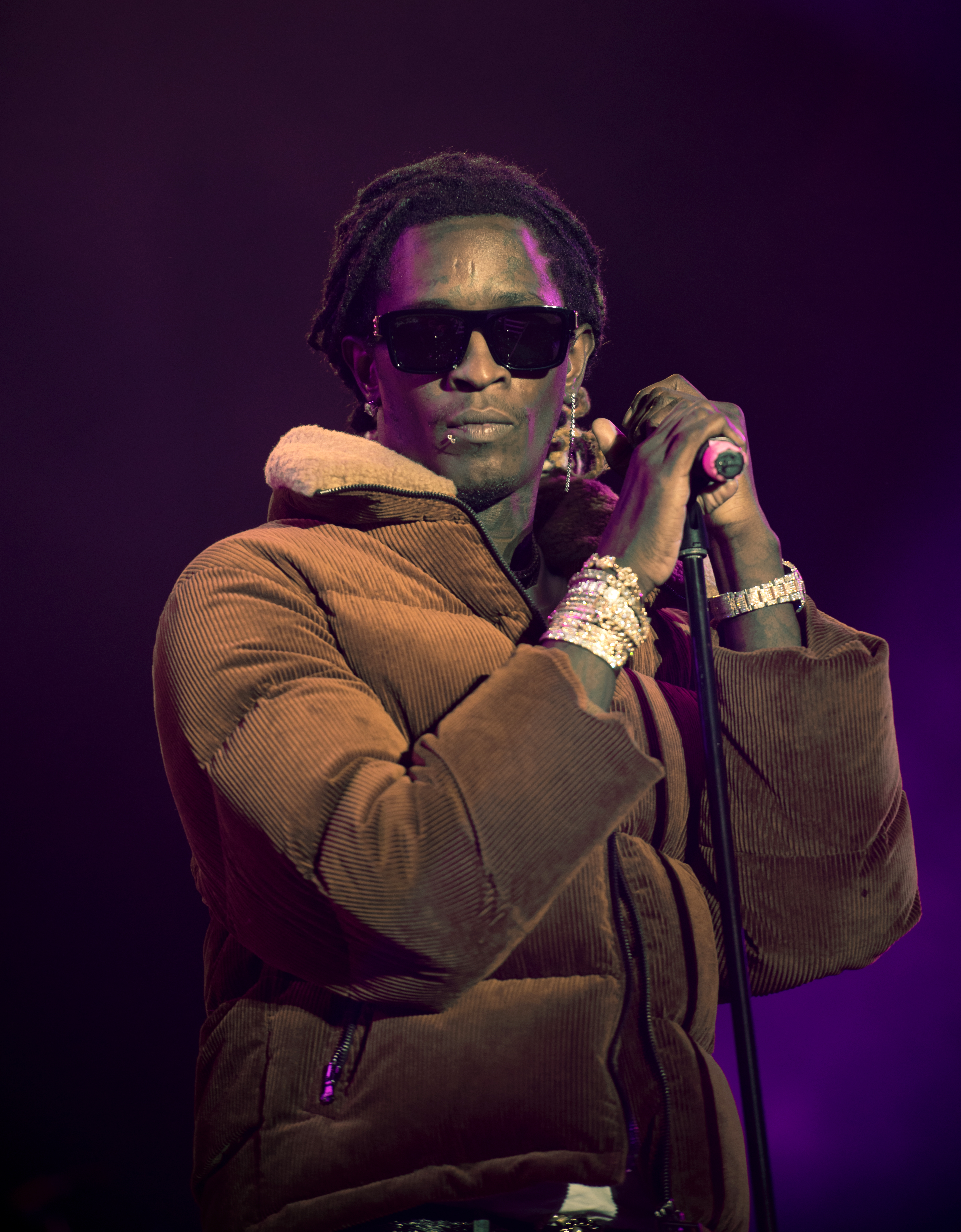 Young Thug live auf dem Openair Frauenfeld 2019